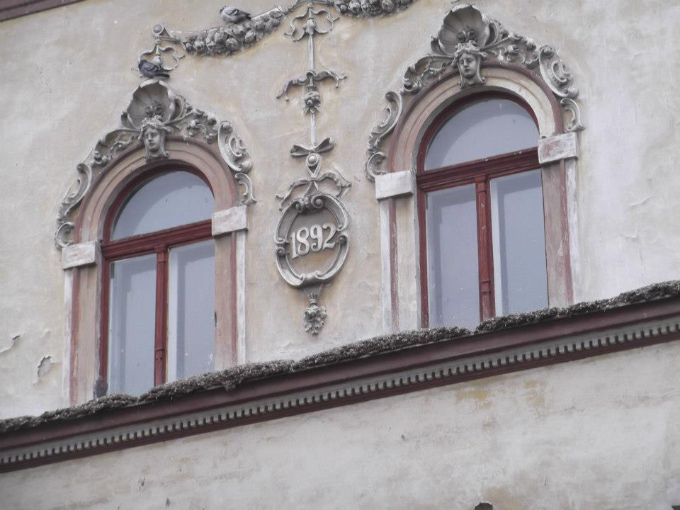 Detaliu arhitectural din Piața Avram Iancu (Arad)